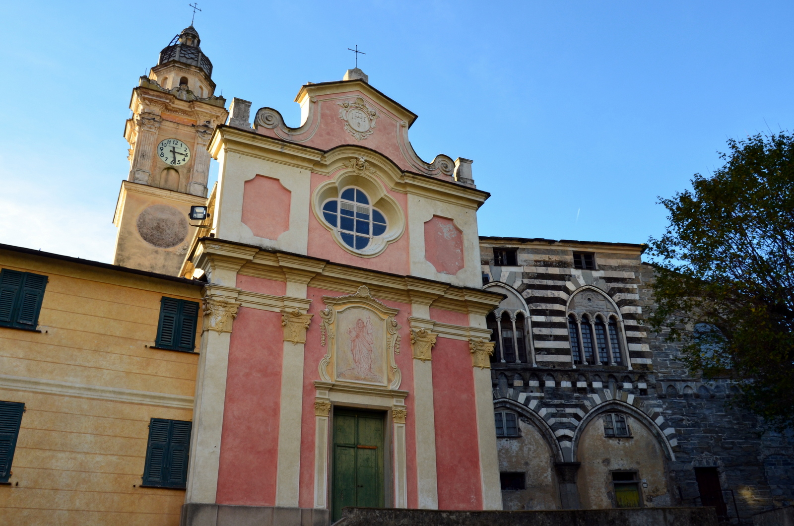 L'ex oratorio di San Salvatore, San Salvatore dei Fieschi, Cogorno, Liguria, Italia